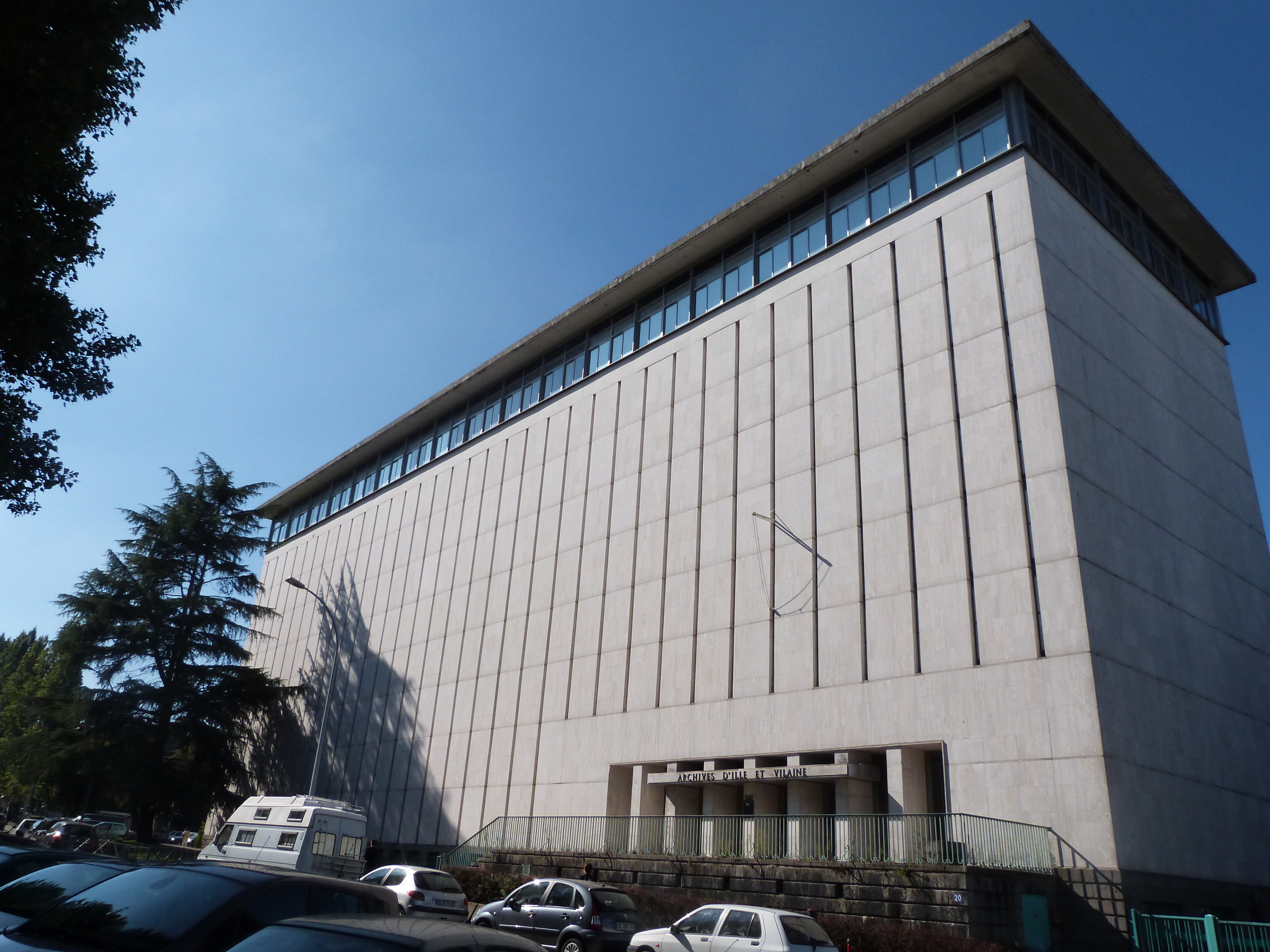 Bâtiment des Archives départementales d'Ille-et-Vilaine, 20 avenue Jules-Ferry, inauguré en 1969 par Henri Fréville, maire et président du conseil général. Les Archives départementales ont déménagé entre 2006 et 2007 vers leur nouveau bâtiment, 1 rue Jacques Léonard.